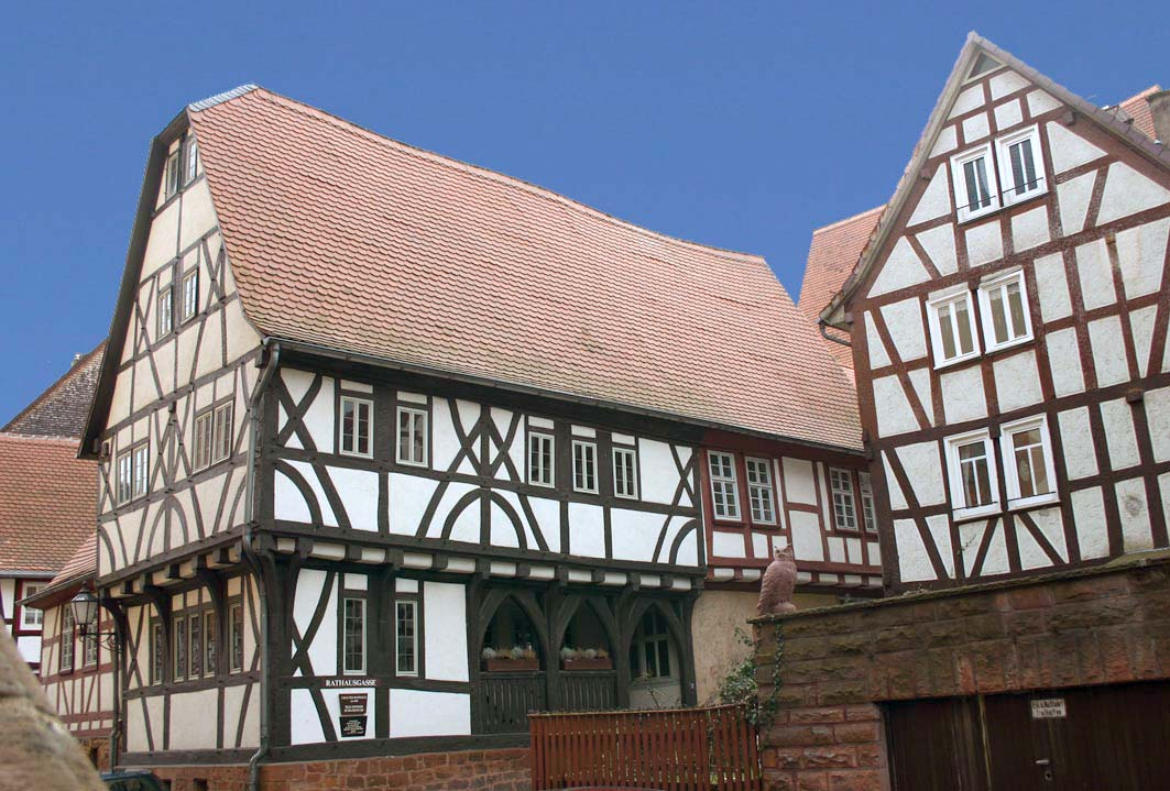 Das "ehemalige Pfarrhaus" hinter dem Historischen Rathaus in Büdingen